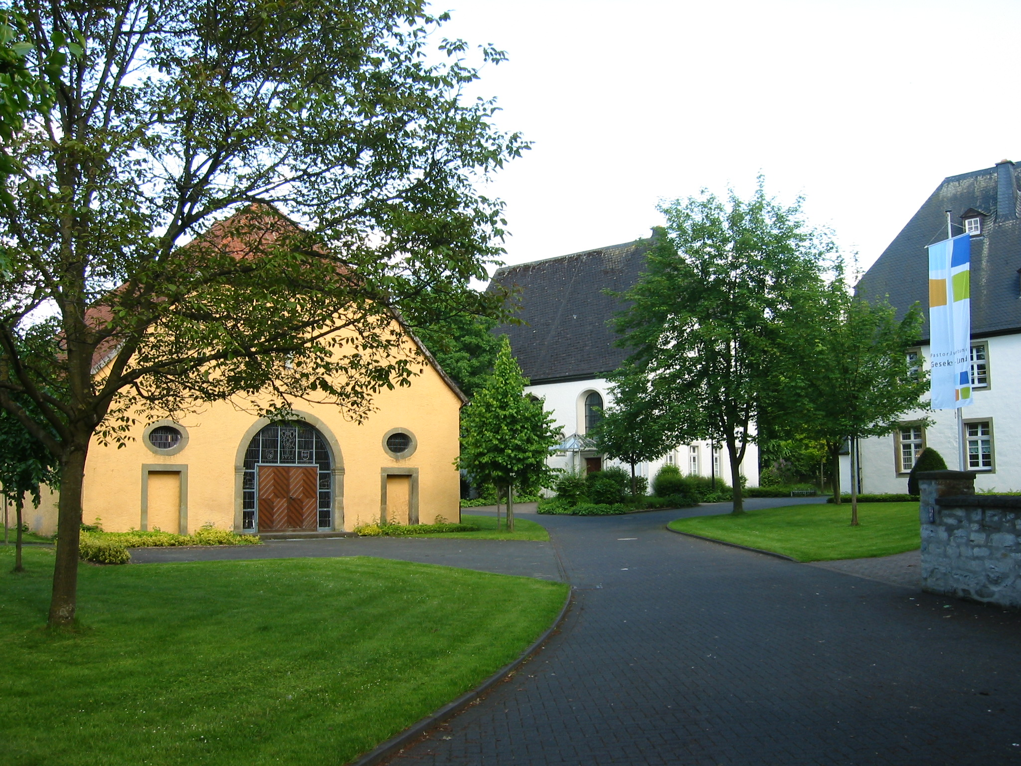 Bereich des ehm. Klosters Nazareth mit Haus Nazareth, Klosterkirche und Pfarrhaus in Störmede